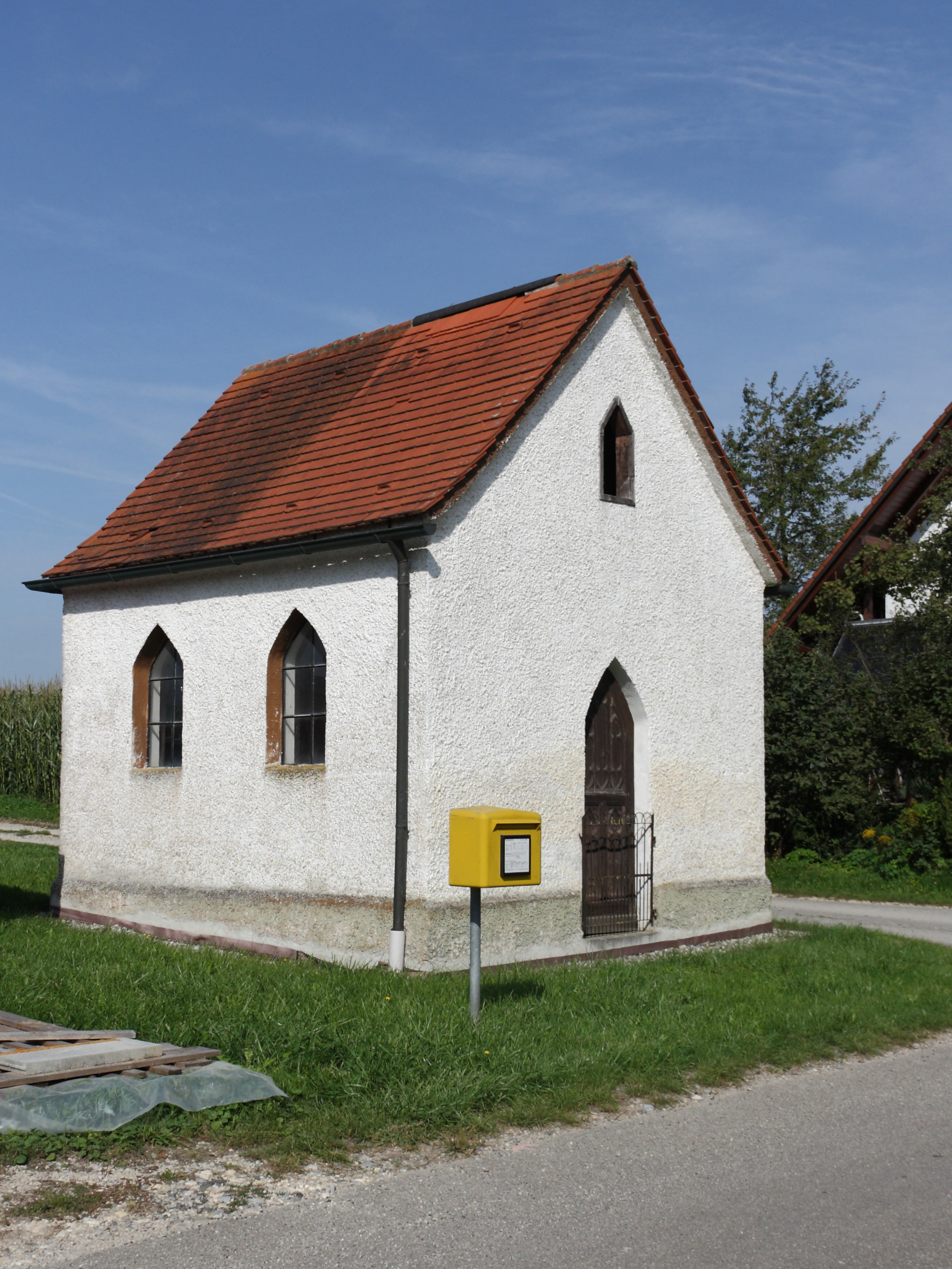 Kapelle St. Isidor in Keuschlingen, Gemeinde Kammeltal; die 1872 errichtete Kapelle ist innen wie außen stark renovierungsbedürftig